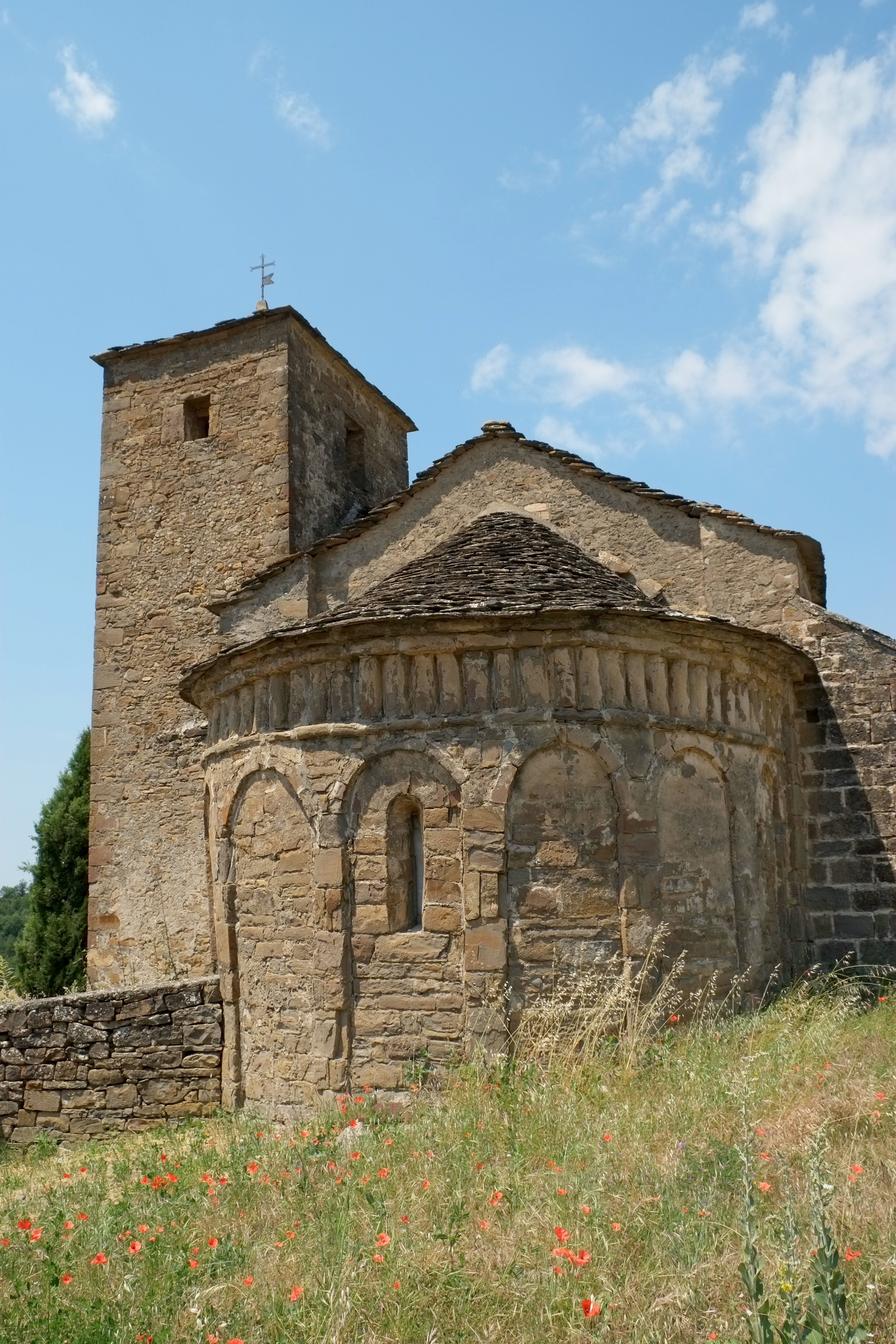 Kirche Santa María in Isún de Basa, einem Ort in der Provinz Huesca in Aragonien (Spanien)